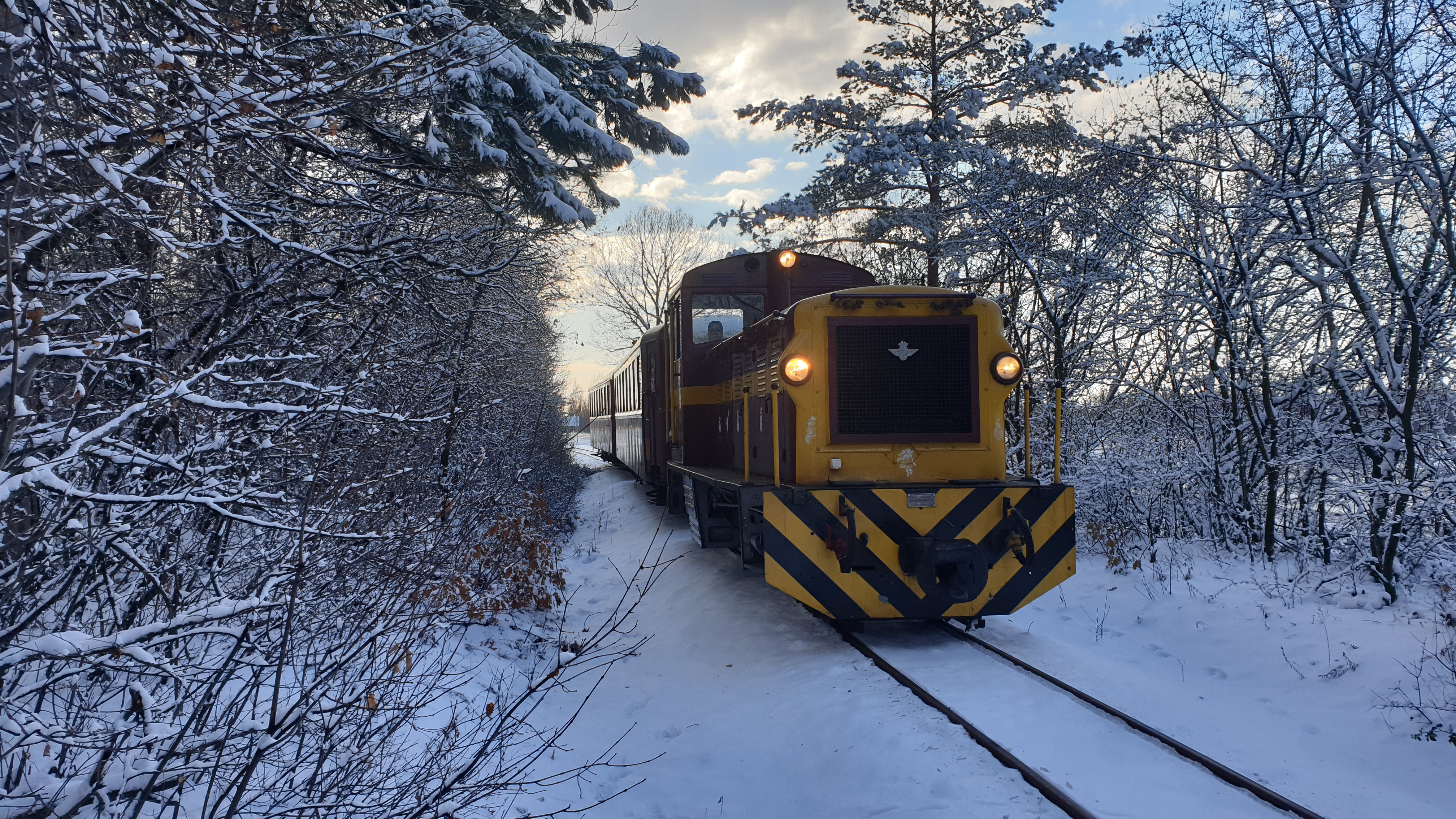 Mk.48-412 télen halad Mátrafüred felé.